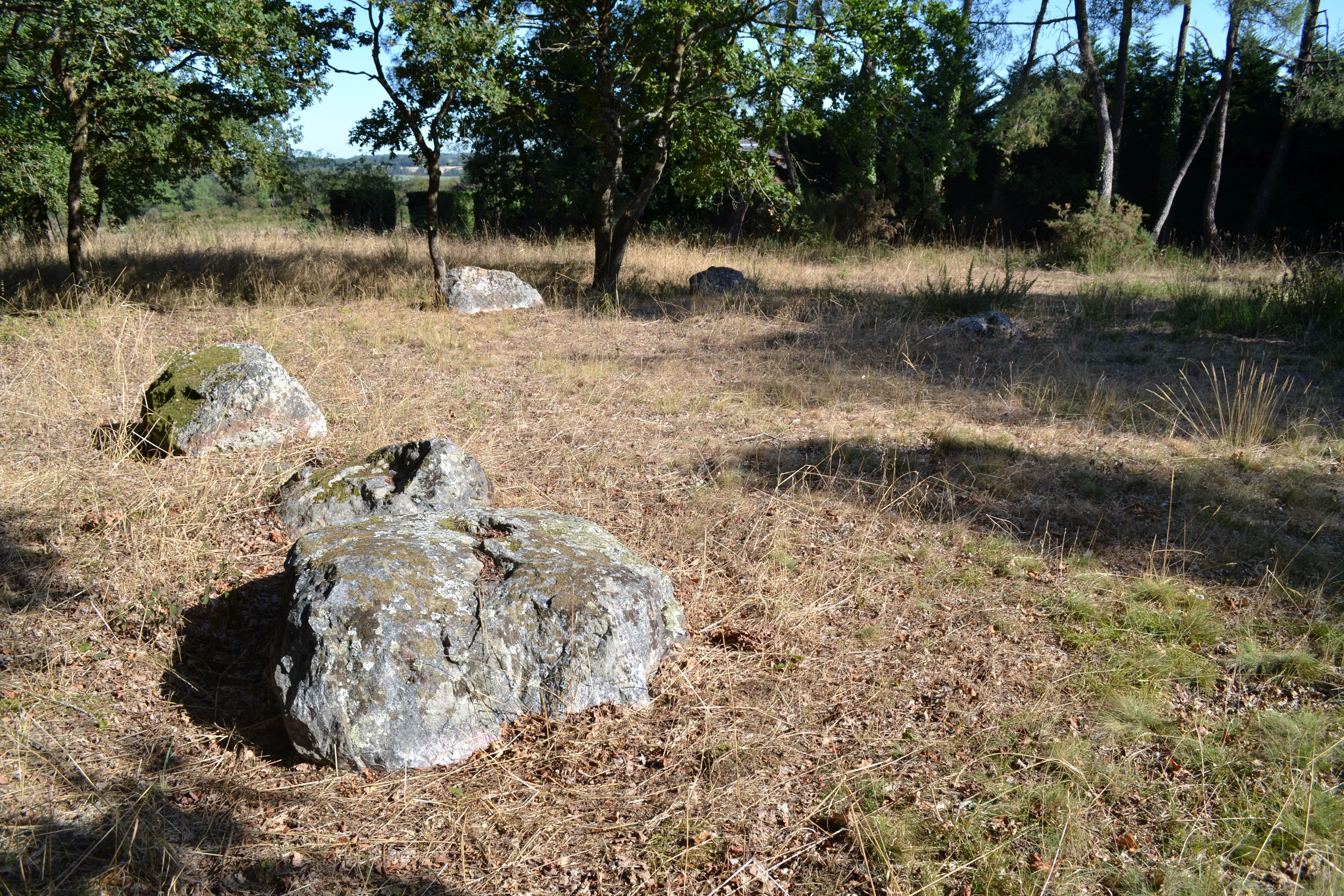 Tertre tumulaire situé au nord de l'alignement des Demoiselles de Langon (35).